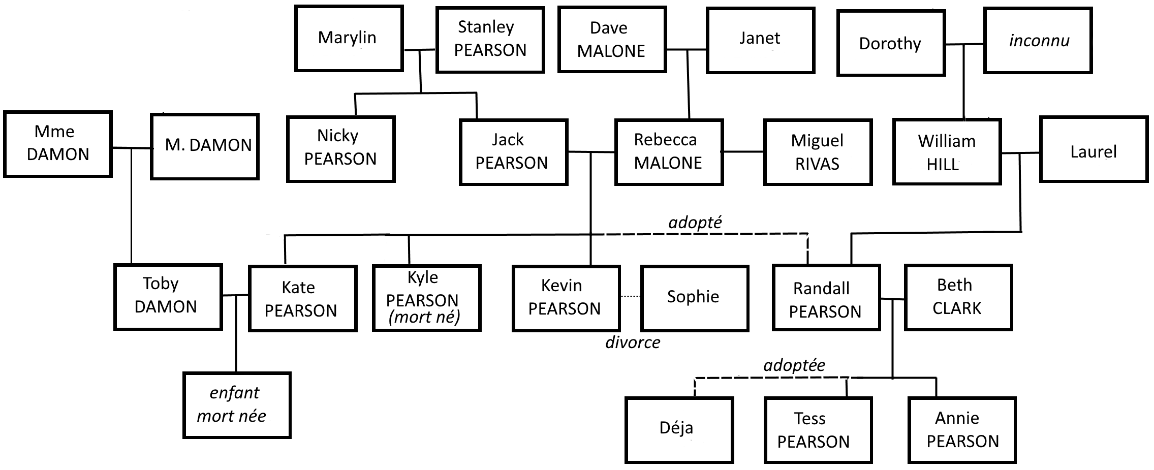 This is us on NBC